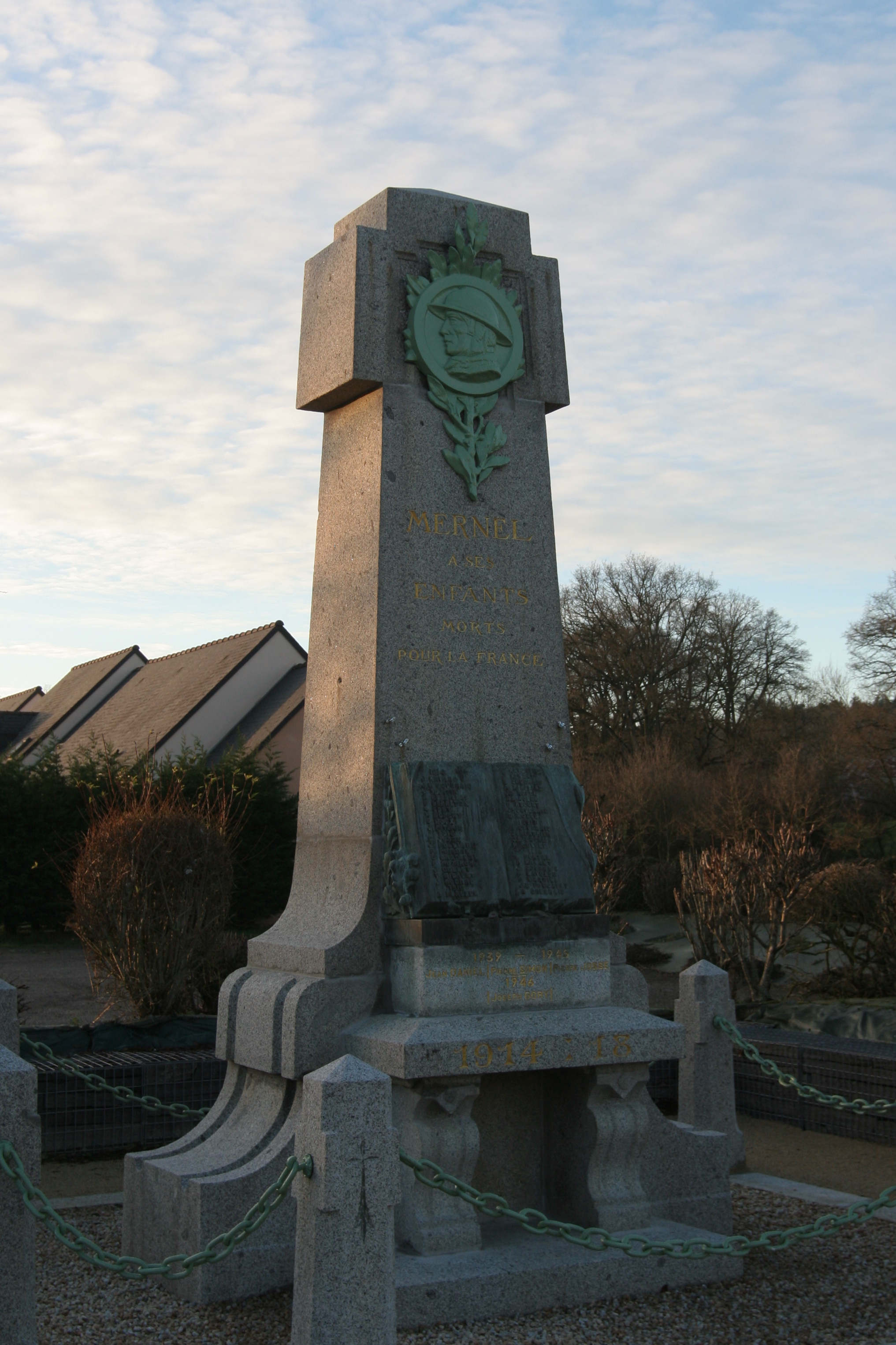 Monument aux morts de Mernel.